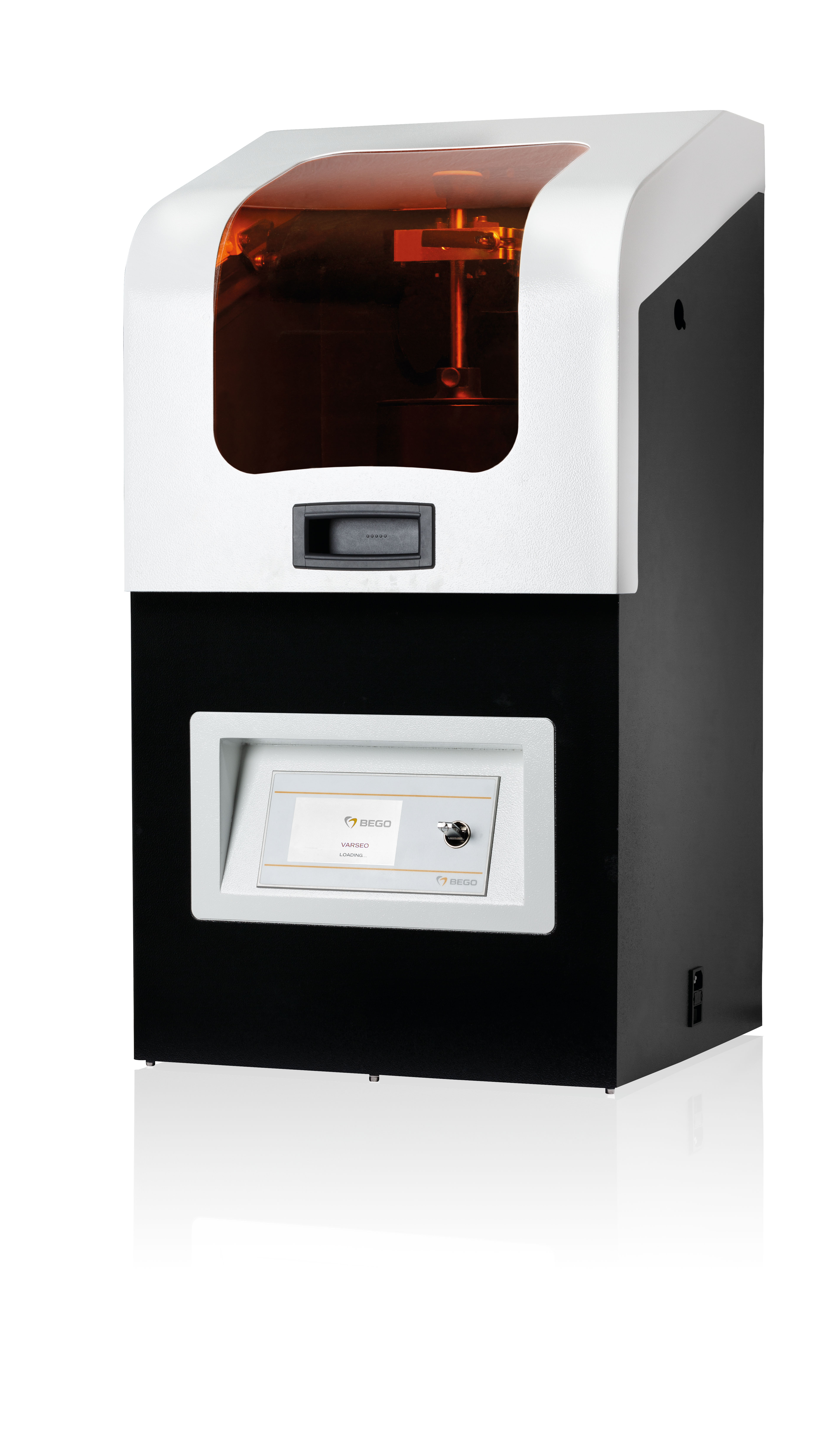 3D-Drucker Varseo